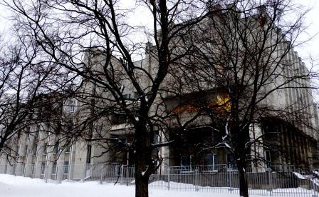 Бывшее здание районного комитета КПСС (Октябрьский район) на Октябрьском проспекте в Петрозаводске. С середины 1990-х годов размещается детская музыкальная школа имени Синисало.